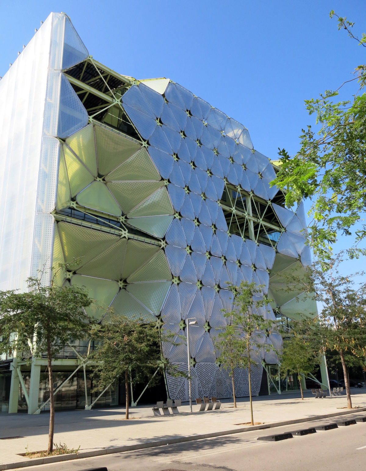 Edifici Media-TIC, c. Sancho de Ávila (Poblenou, Barcelona)